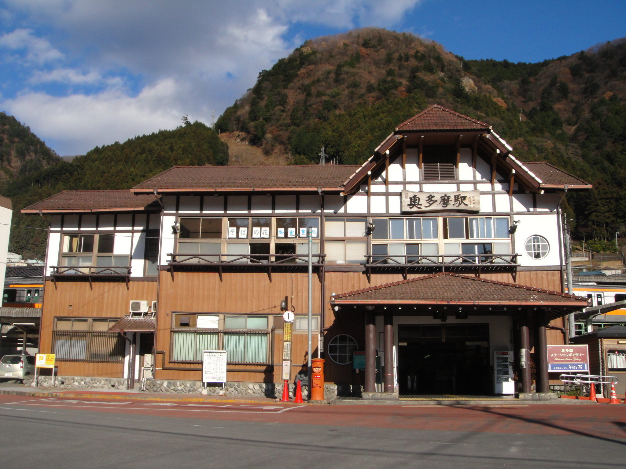 JR青梅線 『奥多摩駅』を正面より撮影。